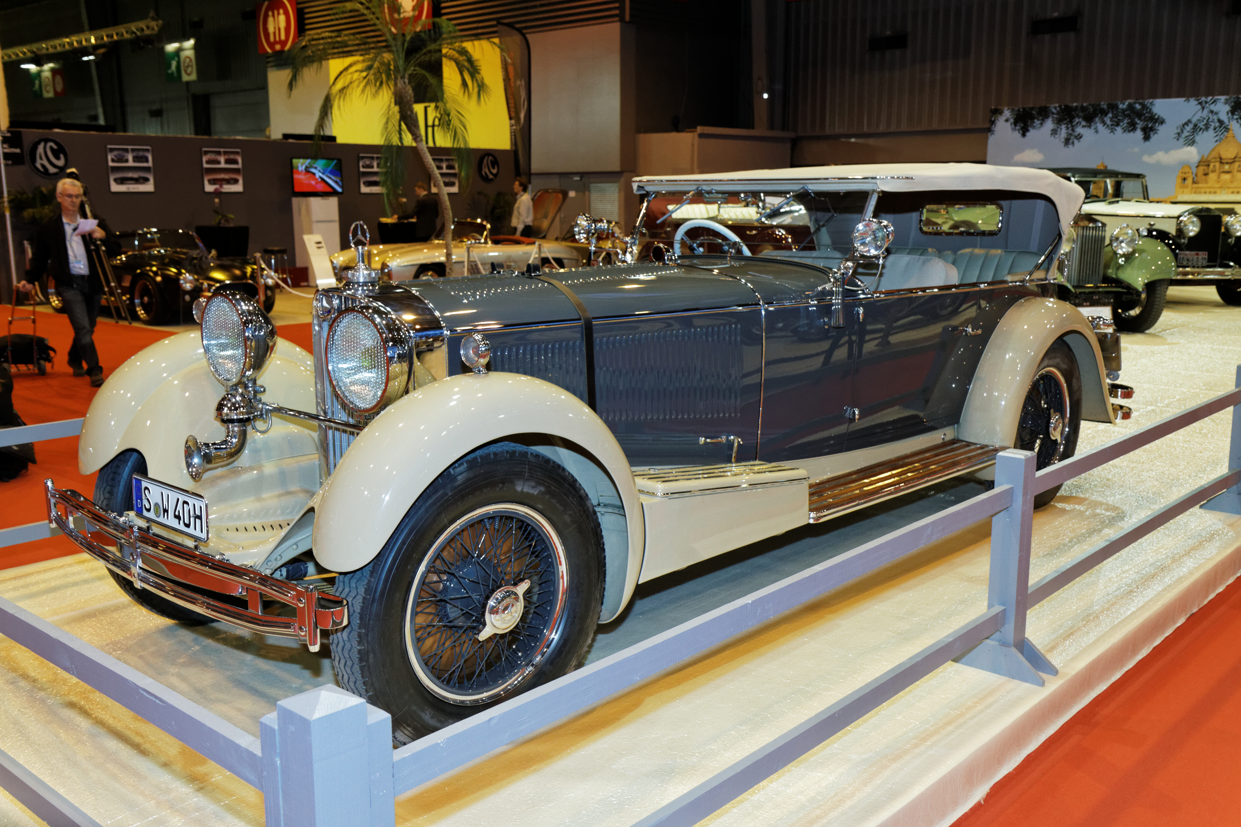 La Mercedes-Benz SS exposée lors du salon Retromobile 2014